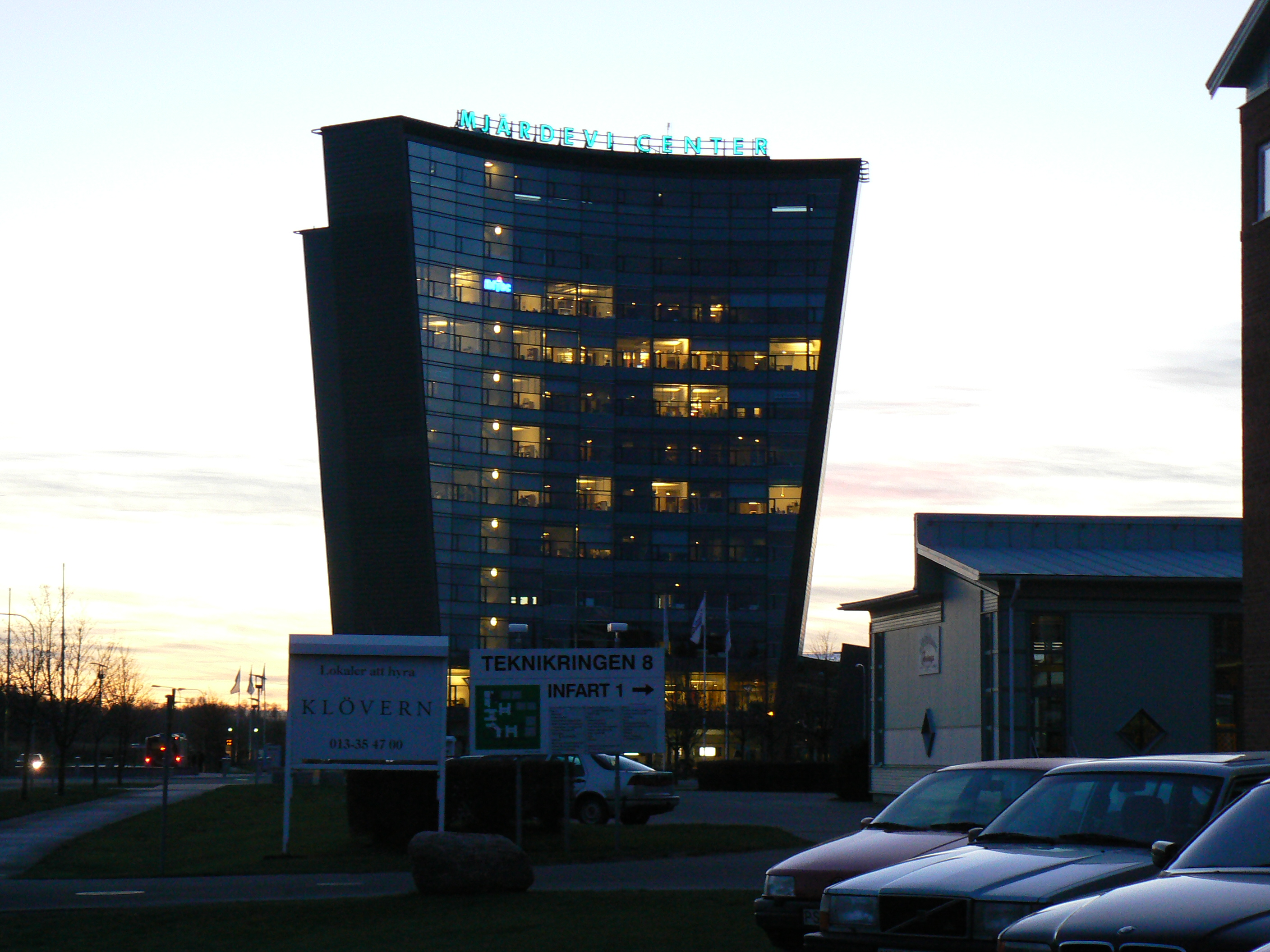 Mjärdevi Center, building in Mjärdevi SciencePark in Linköping, Sweden. Photo by Skvattram 2006-11-09